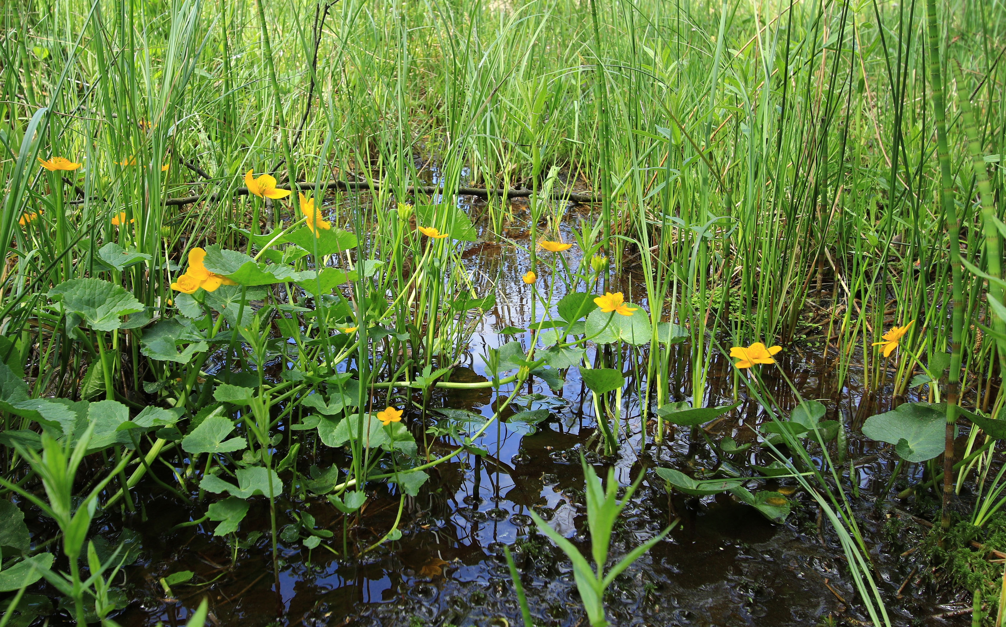 Flora am Schwarzen Teich; Naturschutzgebiet "Hermannsdorfer Wiesen" in Sachsen. Befindet sich auf der rechten Seite Staatsstraße 222 zwischen Geyer und Elterlein.